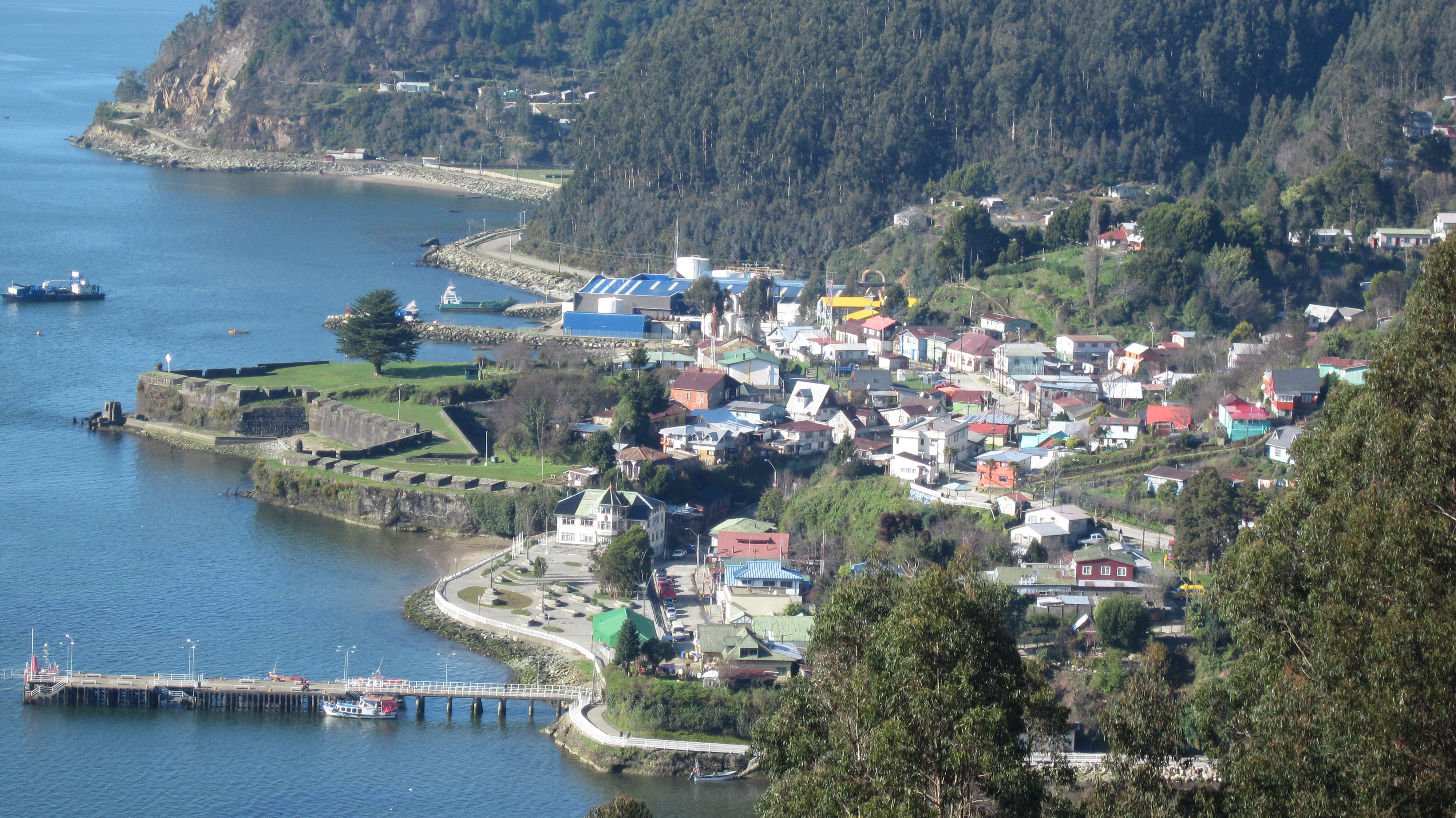 Corral visto desde el cerro.